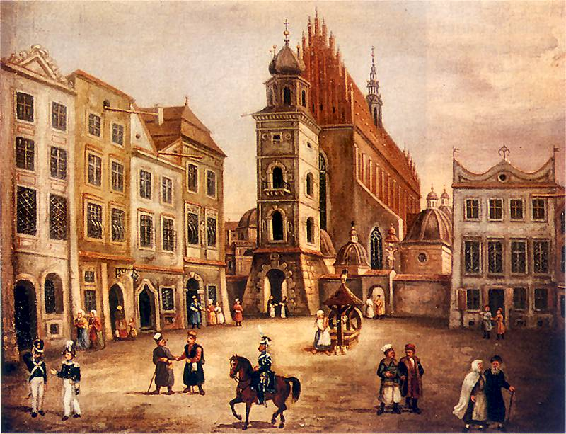 Kościół Dominikanów w Krakowie (przed pożarem w 1850 roku). Marcin Zaleski Kraków 1796 - Warszawa 1877